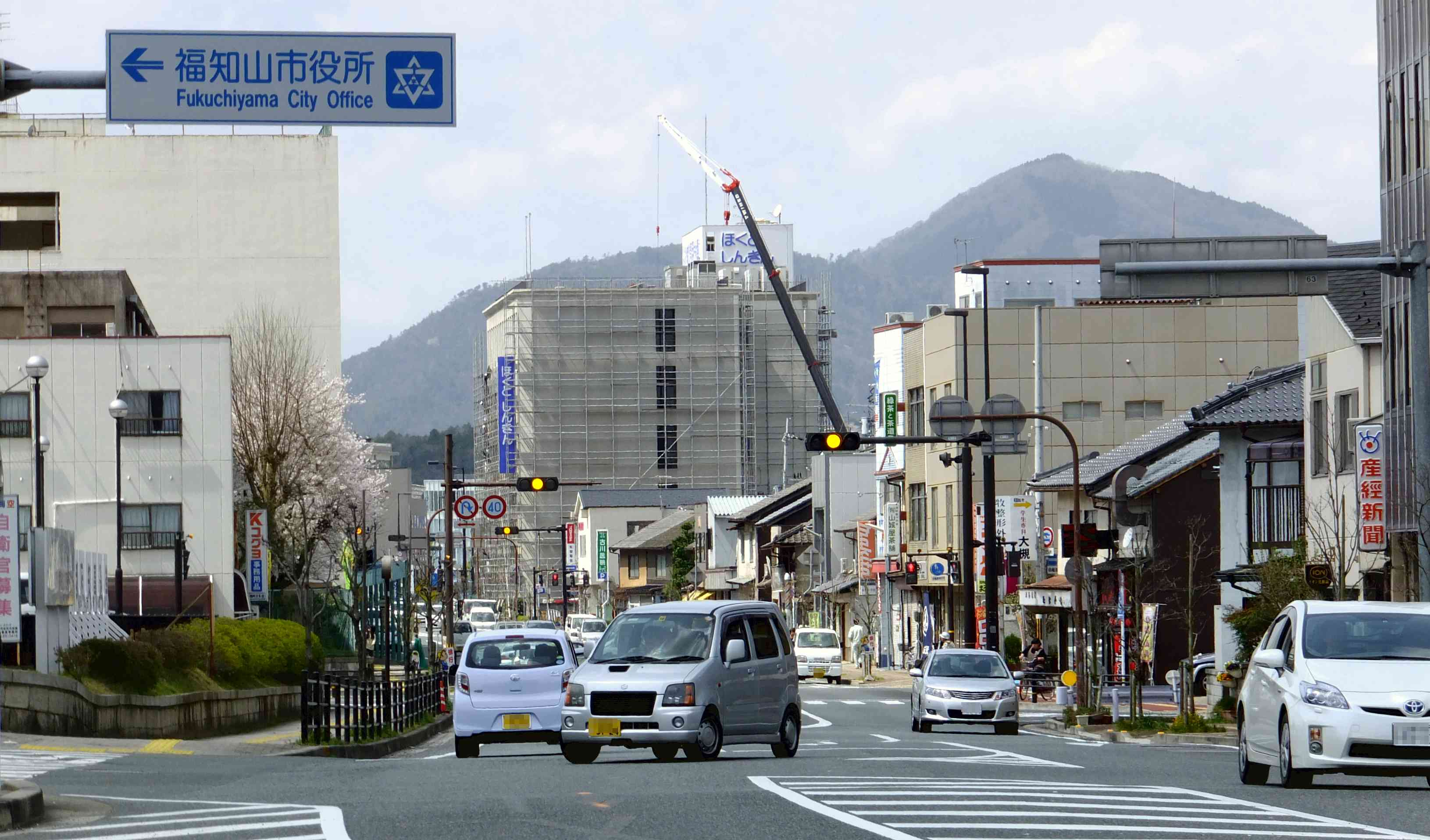 福知山市内を通る府道24号